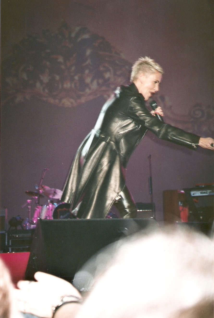 Concerto Roxette no Palau Sant Jordi, 24 de Outubro de 2001